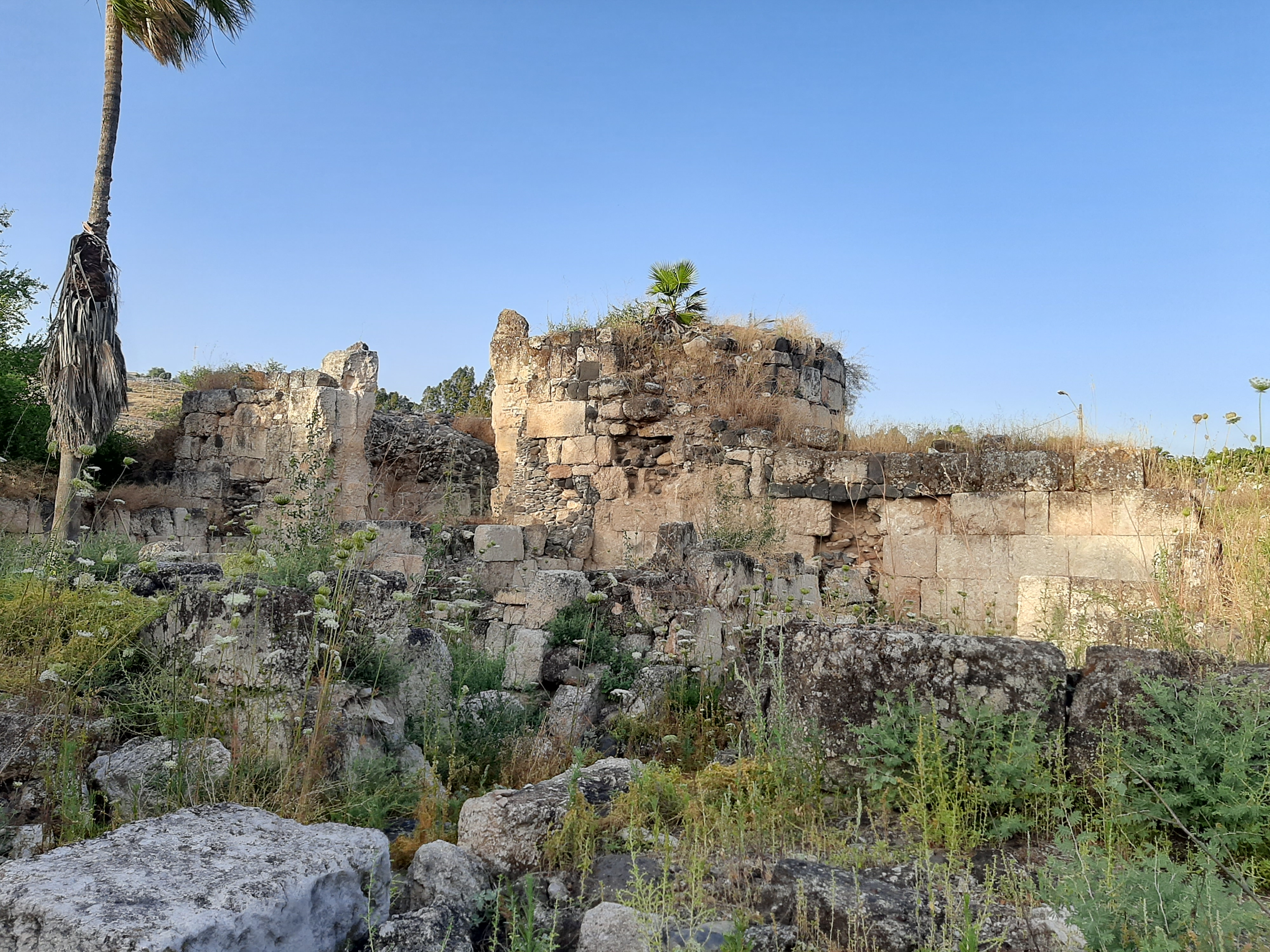 صور لآثار قصر المنية التقتطها بنفسي palestine11